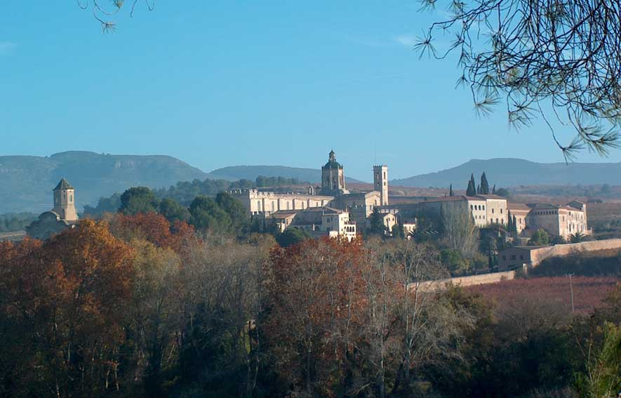 foto de conjunto del Monasterio de Santes Creus